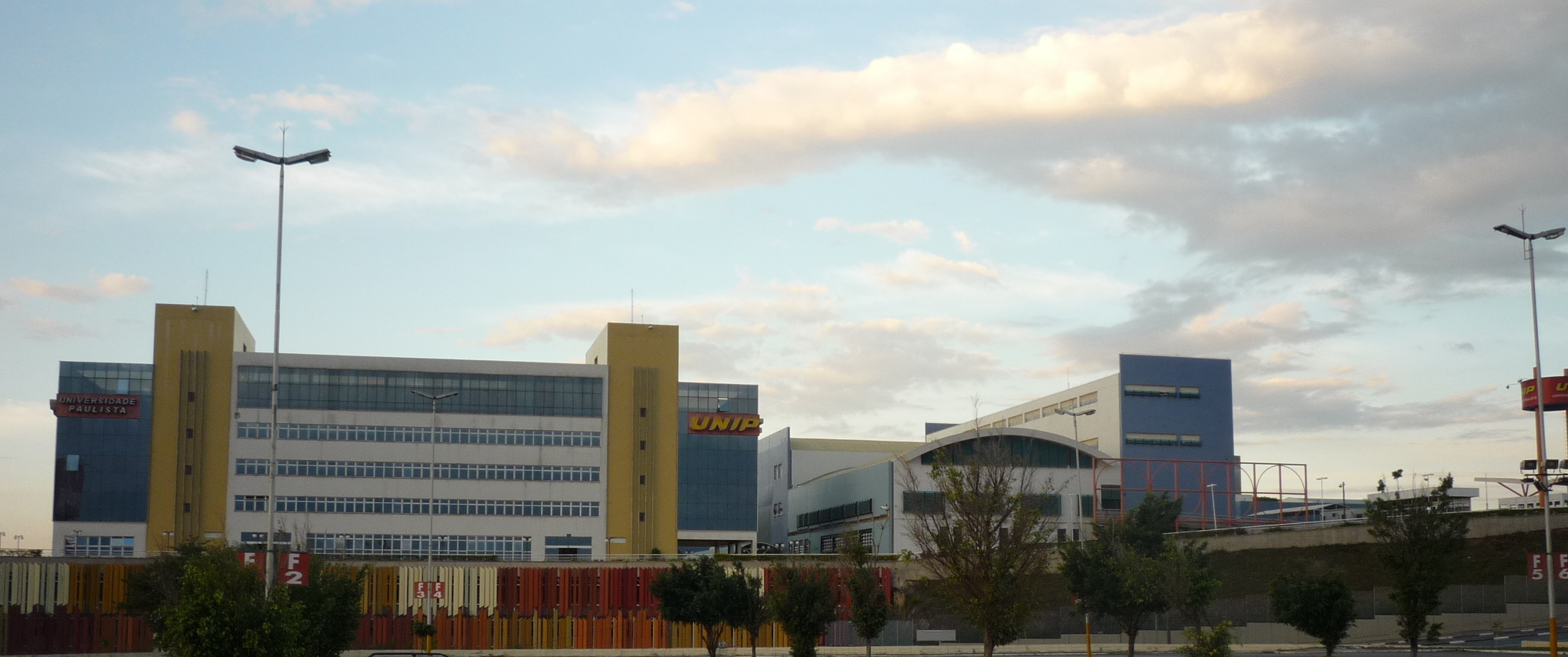 UNIP